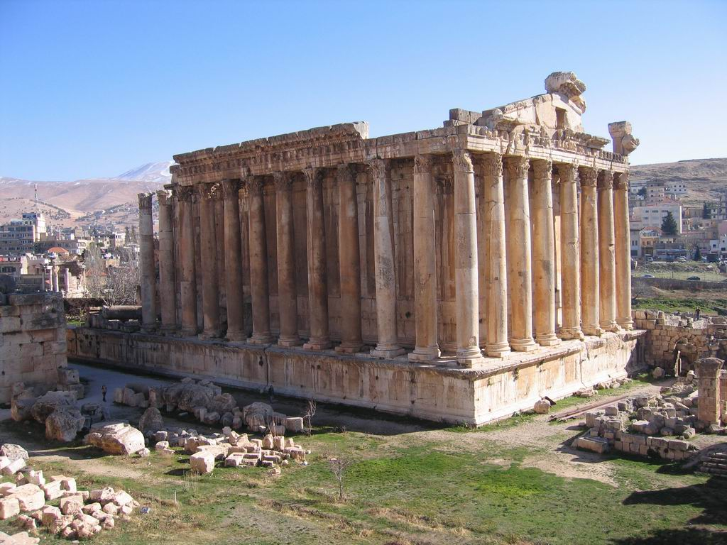 Bacchustempel in Baalbek, Libanon. Dieser Tempel gilt als einer der besterhaltenen Tempel der römischen Antike.